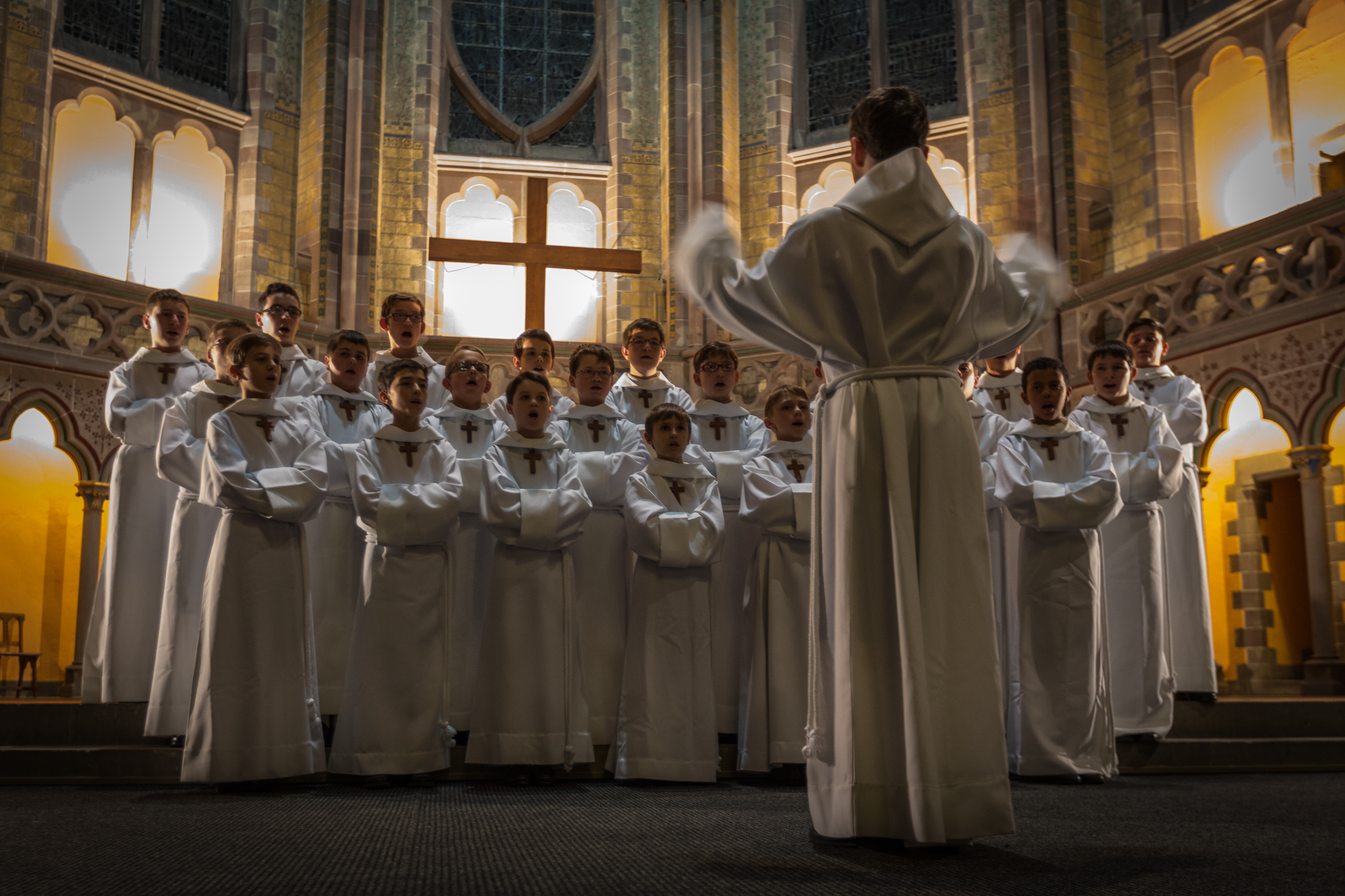 La Manécanterie des Petits Chanteurs à la Croix de Bois en concert à l’église Saint-Paul de Strasbourg pour un concert organisé par la l’Ordre international des Anysetiers, chapitre de Strasbourg, au profit de l’association Semeurs d’Étoiles' le 9 novembre 2013.